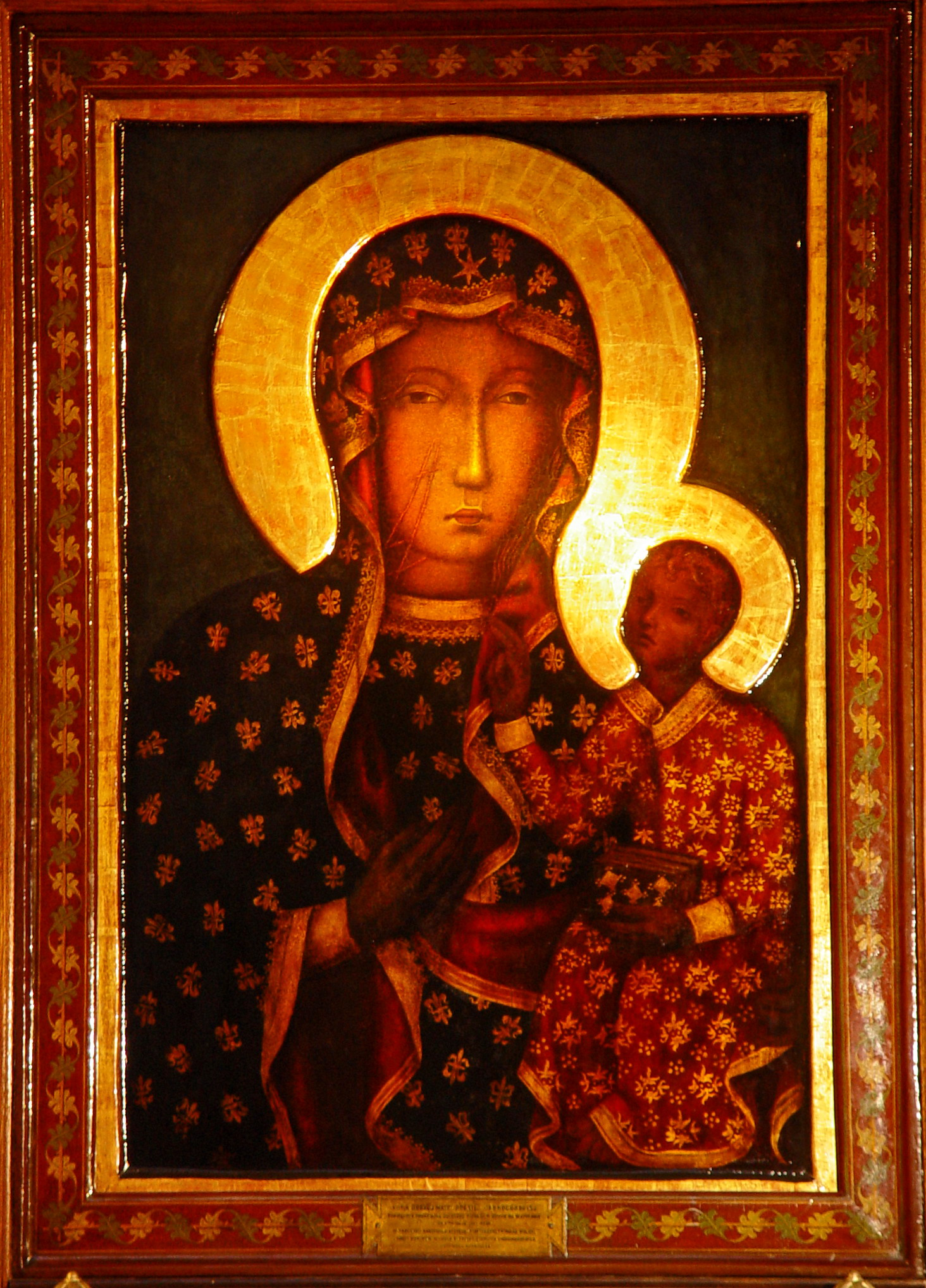 KOPIA OBRAZU MATKI BOSKIEJ CZĘSTOCHOWSKIEJ - PARAFIA NPNMP W BUSKU-ZDROJU